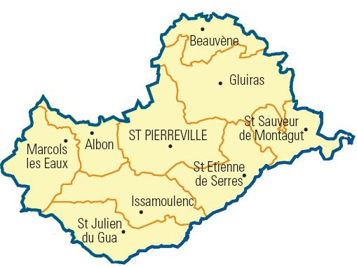 Carte détaillée des communes du canton (Ardèche)